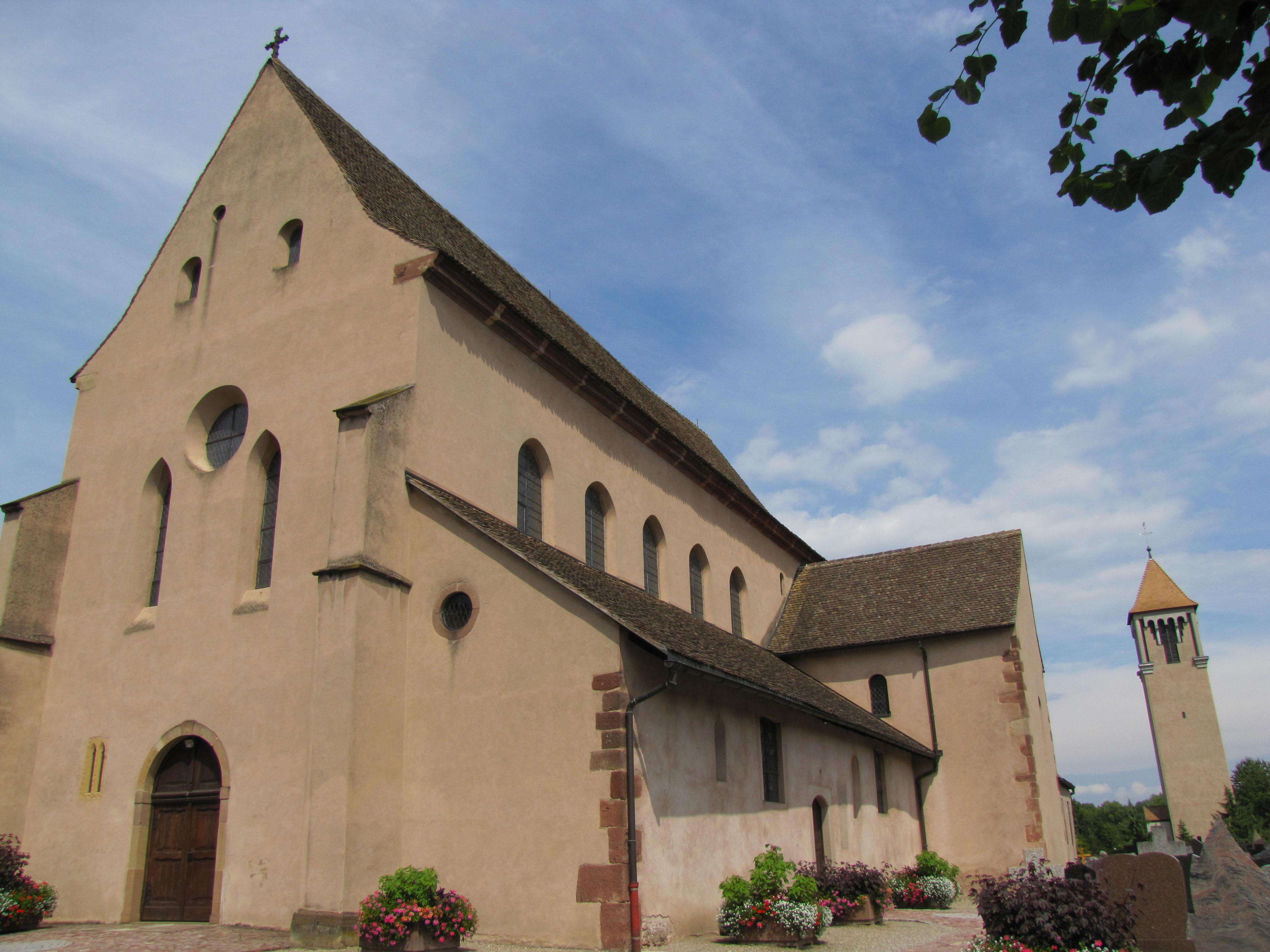 Alsace, Bas-Rhin, Église Saint-Trophime d'Eschau (PA00084707, IA00023089).